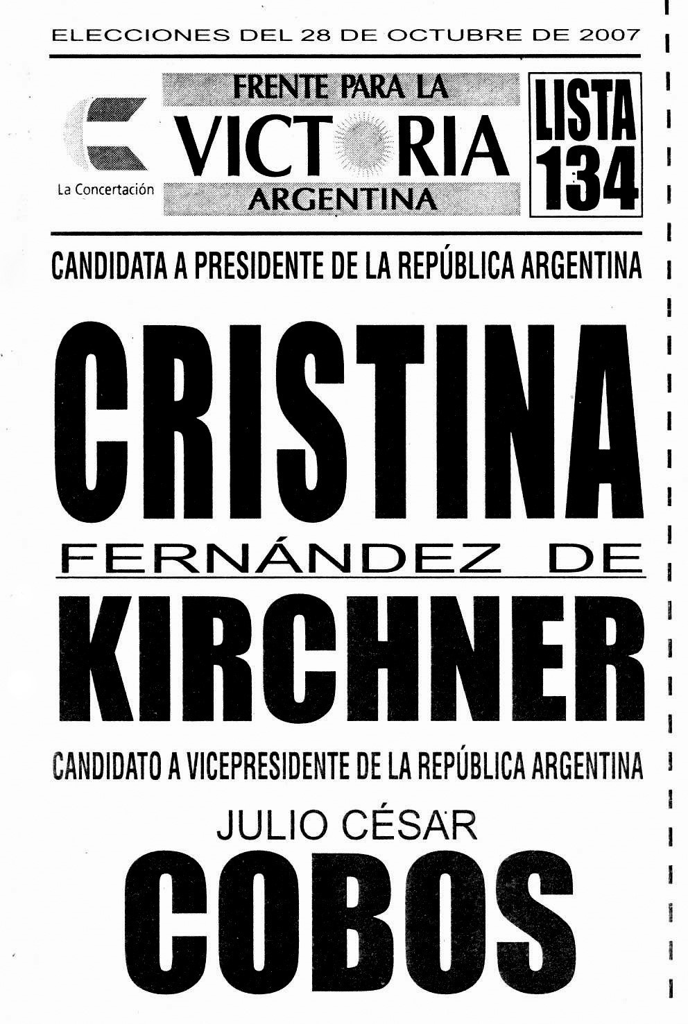 Boleta electoral para la fórmula Cristina Fernández-Julio Cobos, perteneciente a las elecciones presidenciales de Argentina de 2007